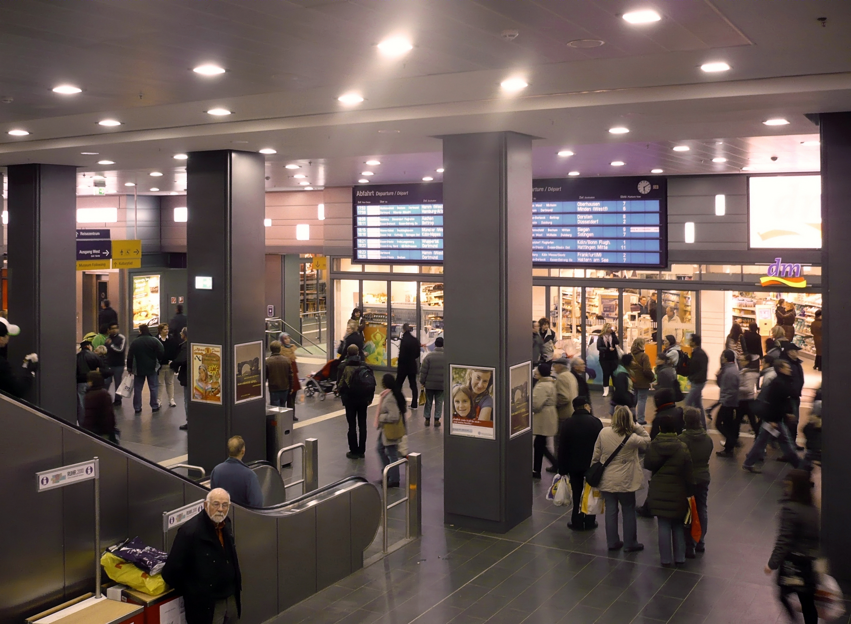 Essen Hauptbahnhof, Empfangshalle